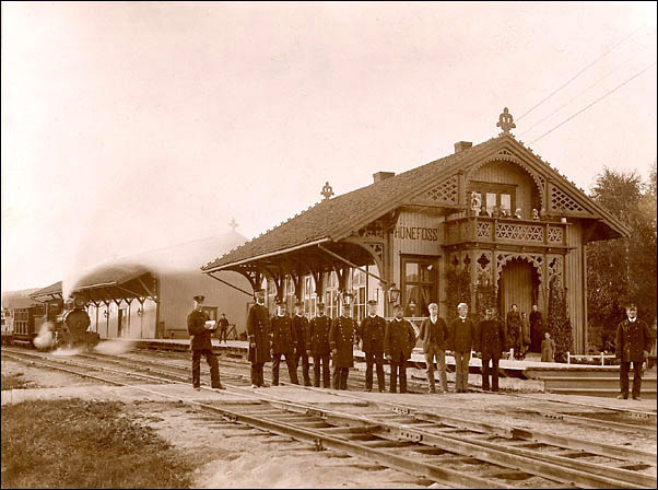 Gamle Hønefoss stasjon (bygningene revet i 1987)